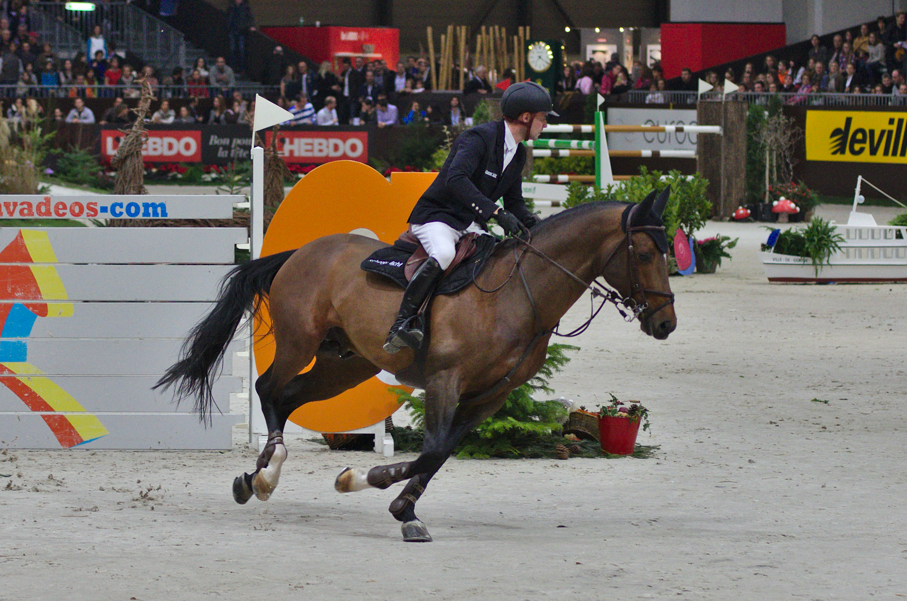 54eme CHI de Genève - 20141213 - Prix Credit Suisse - Romain Duguet et Otello du soleil